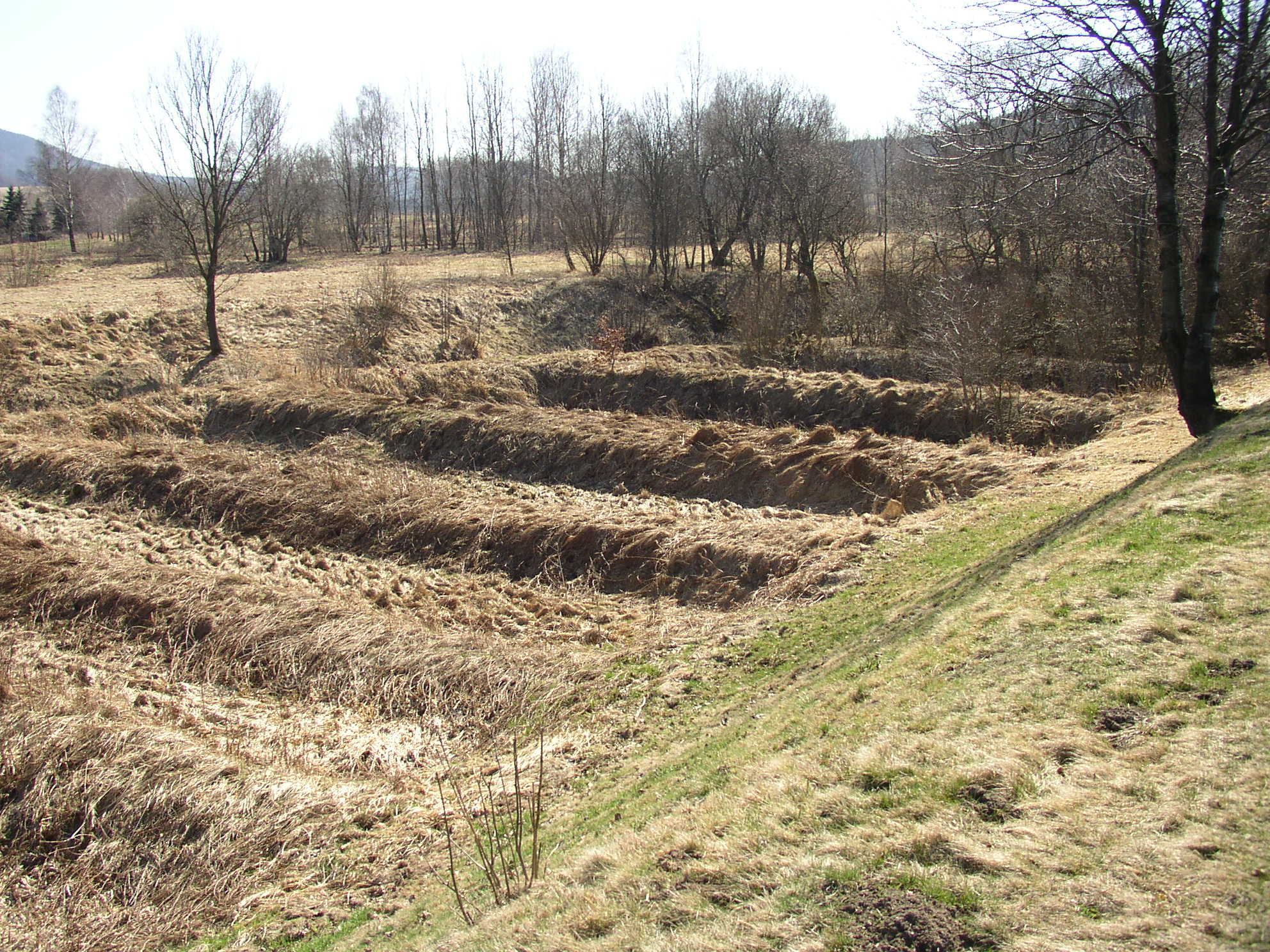 Plůdkové rybníčky, Velký rybník, okres Děčín, Ústecký kraj, Česká republika